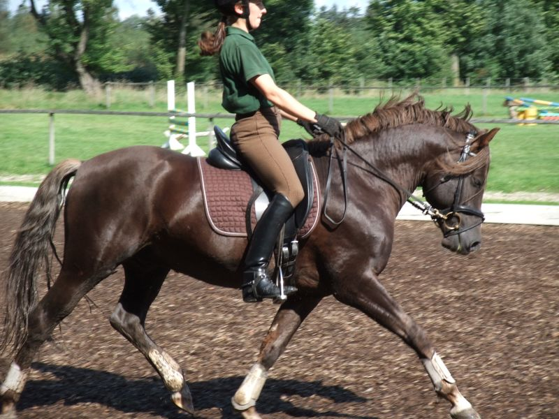 Deutsches Reitpony